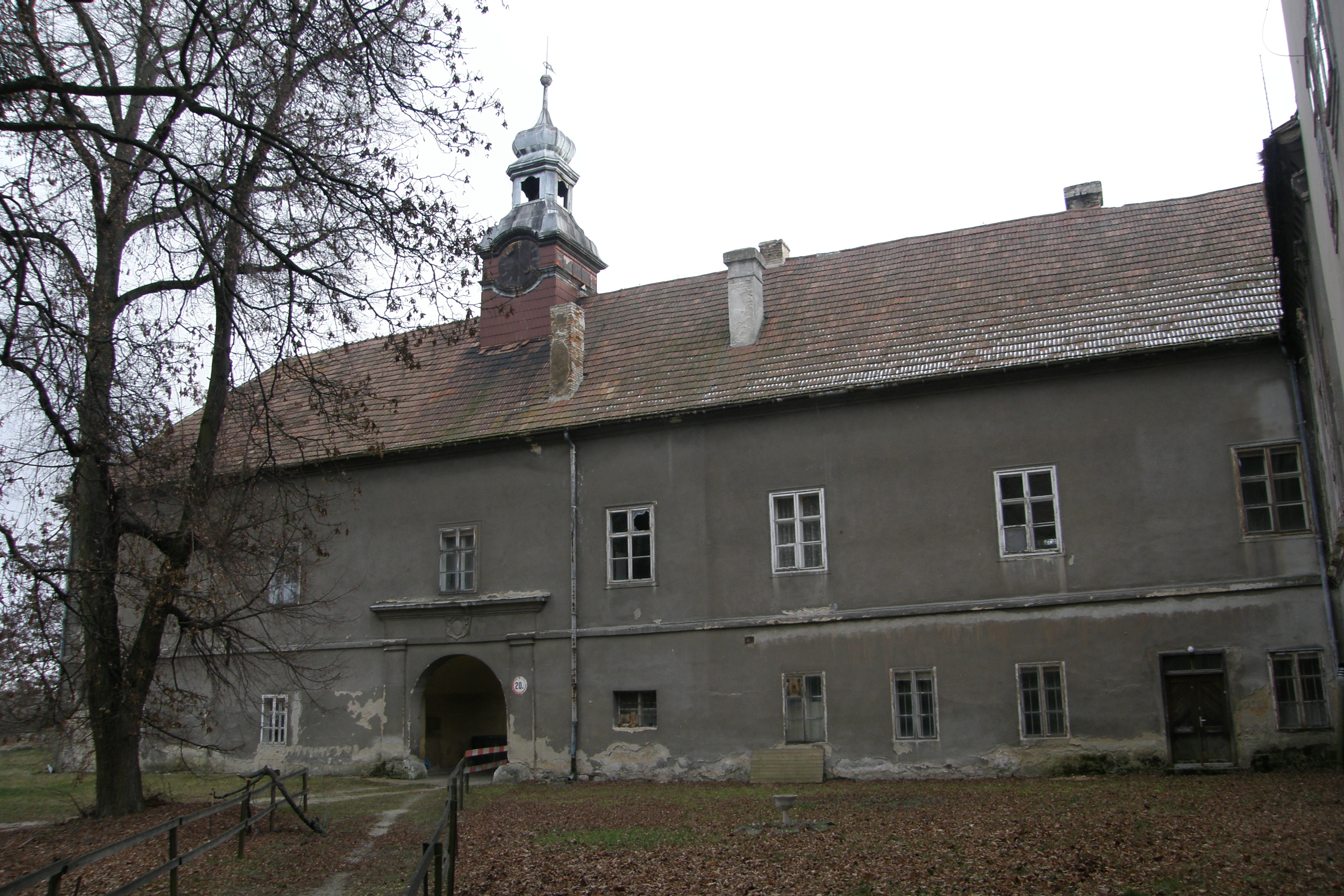 Schloss Rabensburg, 1. Hof, linker Flügel